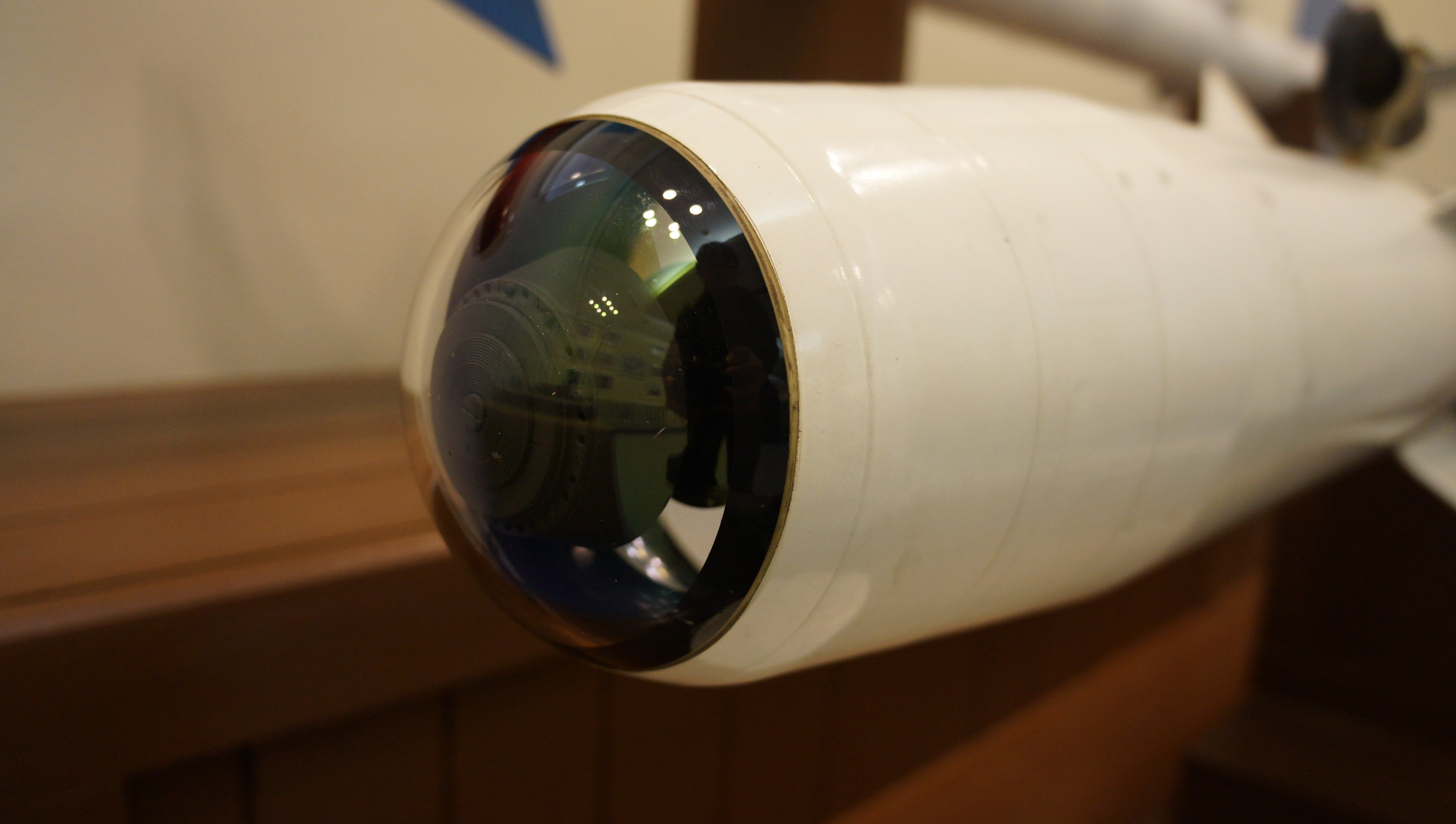 航空自衛隊 69式空対空誘導弾（AAM-1） 実物大模型 シーカー部。 13年4月6日 航空自衛隊奈良基地資料館にて。